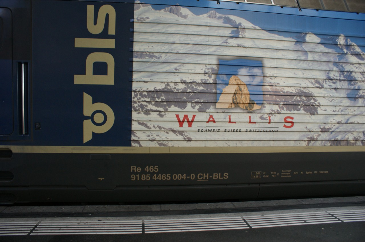 Neue TSI-konforme, zwölfstellige Loknummer an der BLS Re 465 004 mit Werbung für das Wallis. Ersetzt die bisherige Nummer 465 004-0 bzw. intern nach UIC-Regel 95 63 0 465 004-0